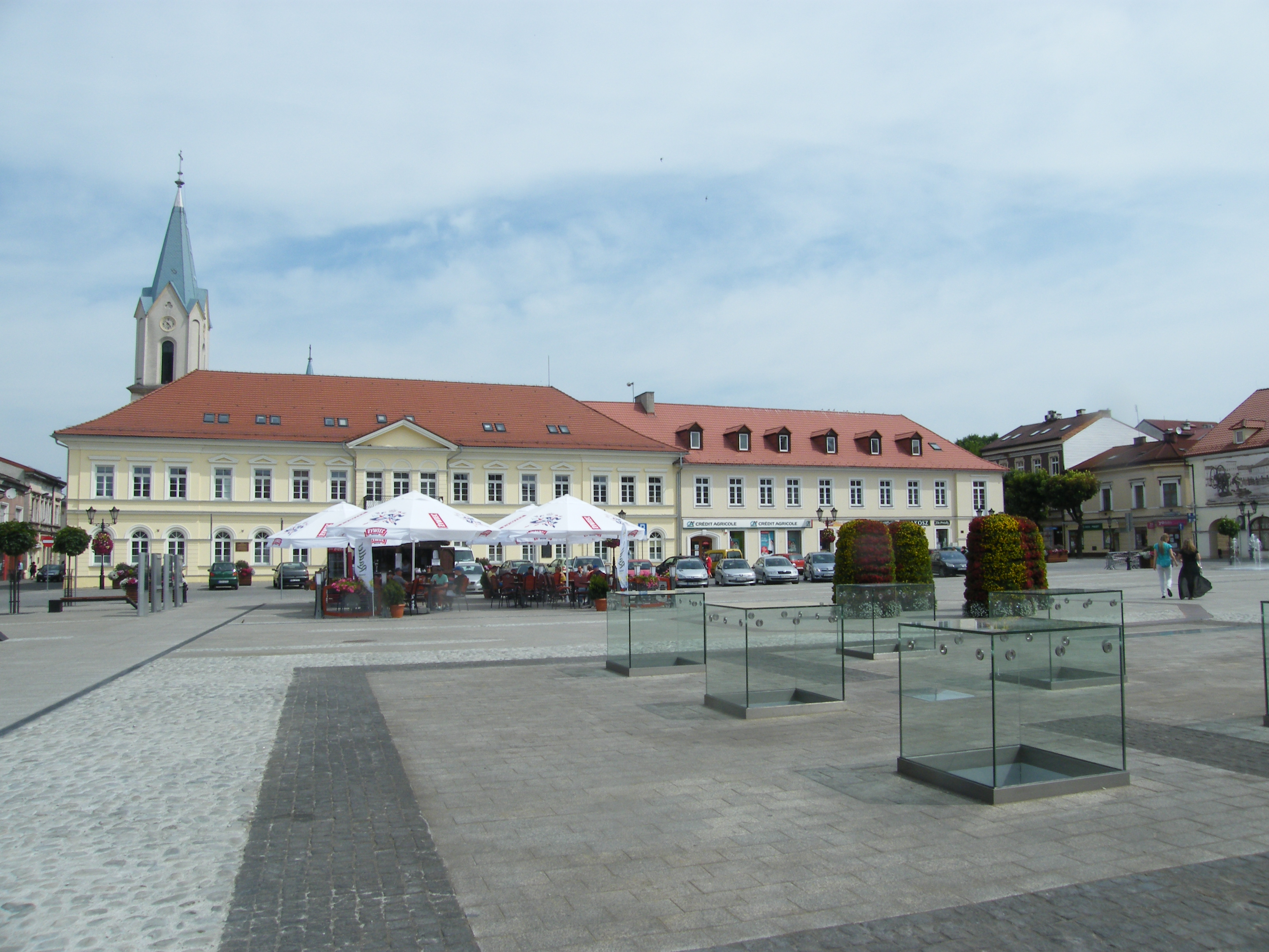 Oświęcim, ratusz, 1 poł. XIX